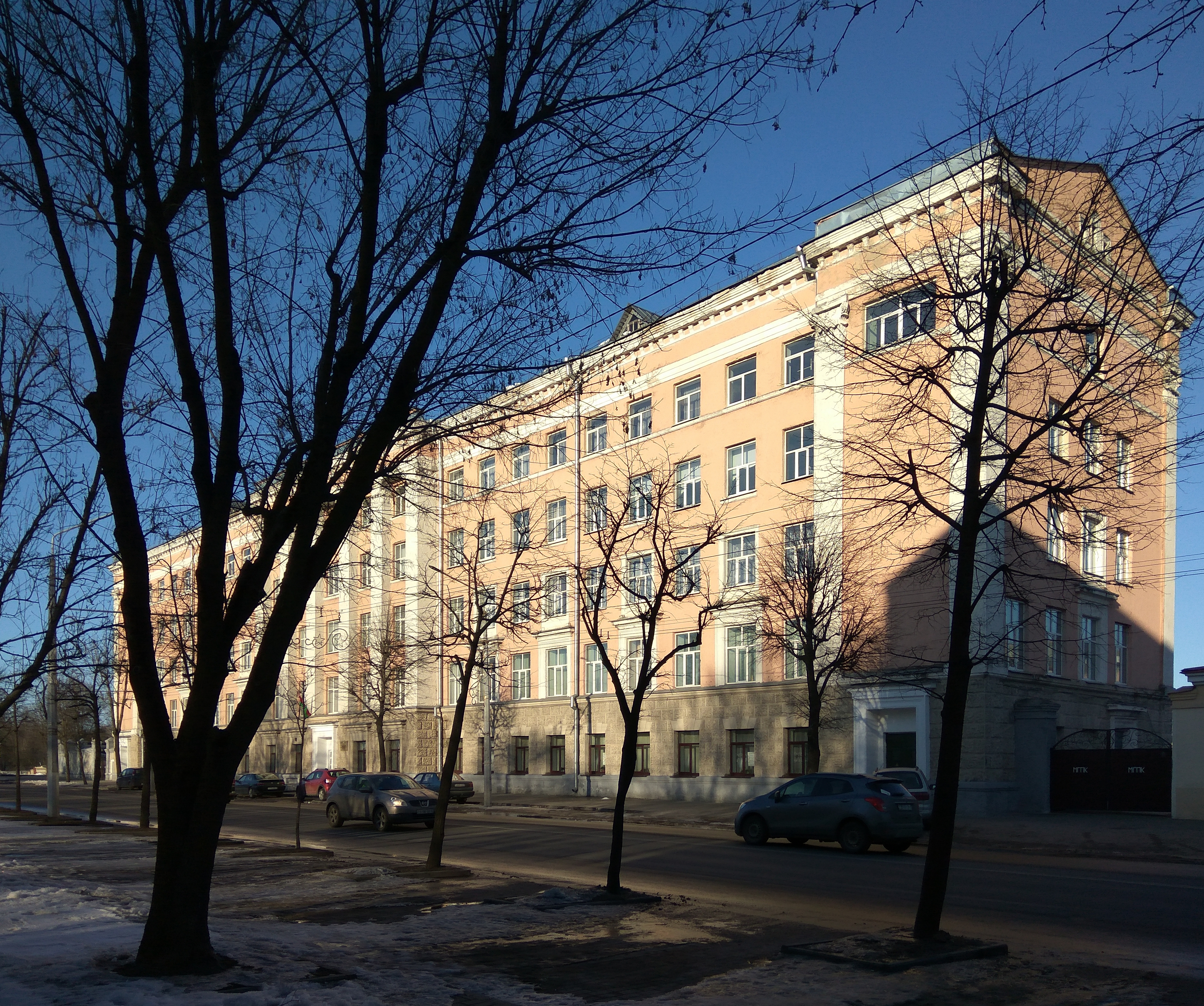 Магілёў. Першамайская вуліца (вясна 2018)